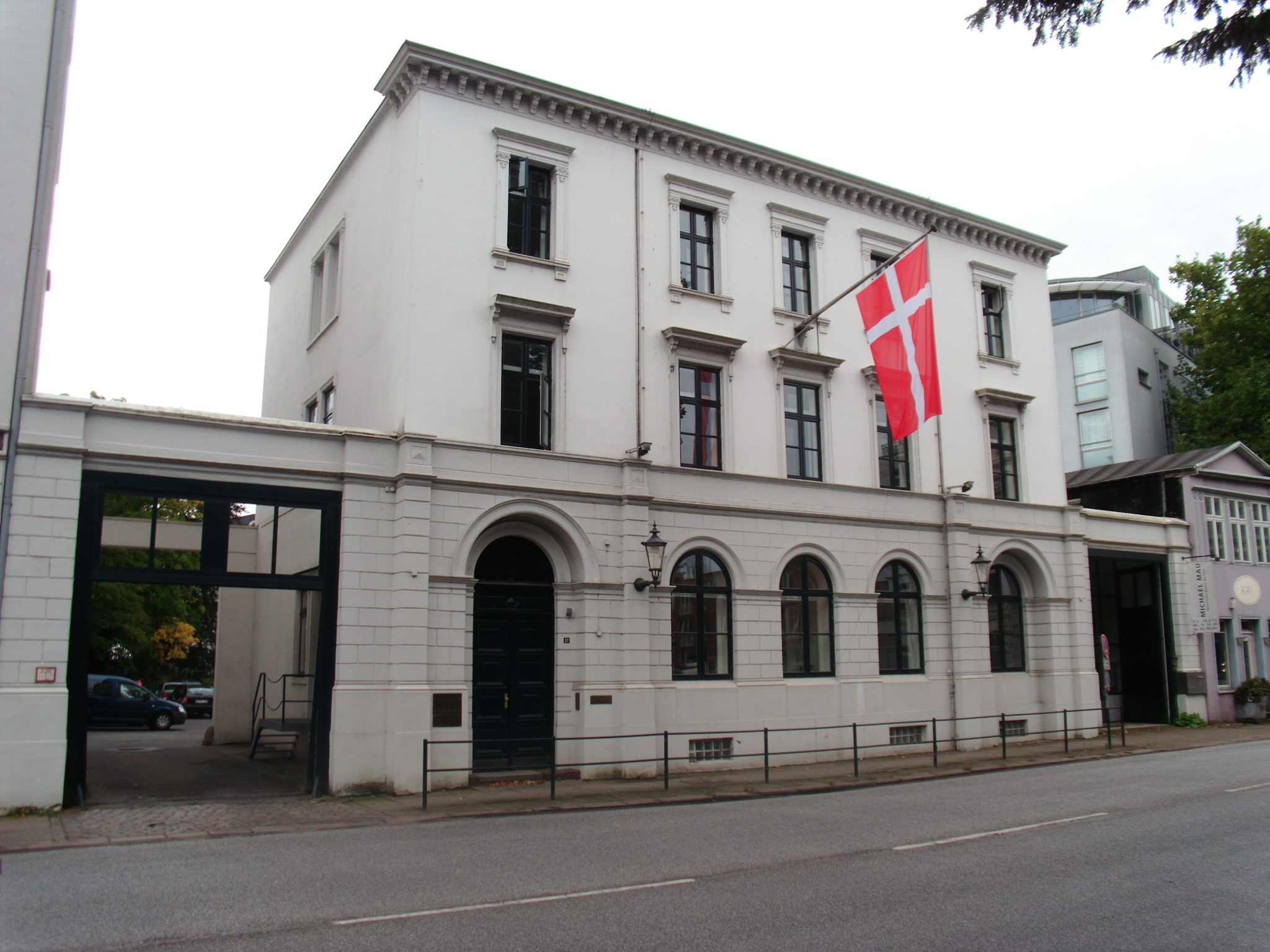 Dreigeschossiger Putzbau in spätklassizistischen Formen, 1845 als „Zolletablissement“ errichtet.This is a photograph of an architectural monument.